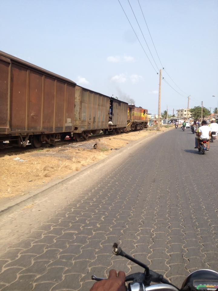 Photo prise à Vodje par PM Gosselin This is an image with the theme "Africa on the Move or Transport" from: Benin